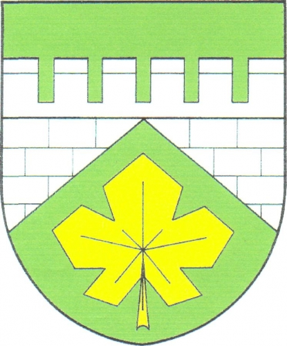 znak, Javorek, okres Žďár nad Sázavou